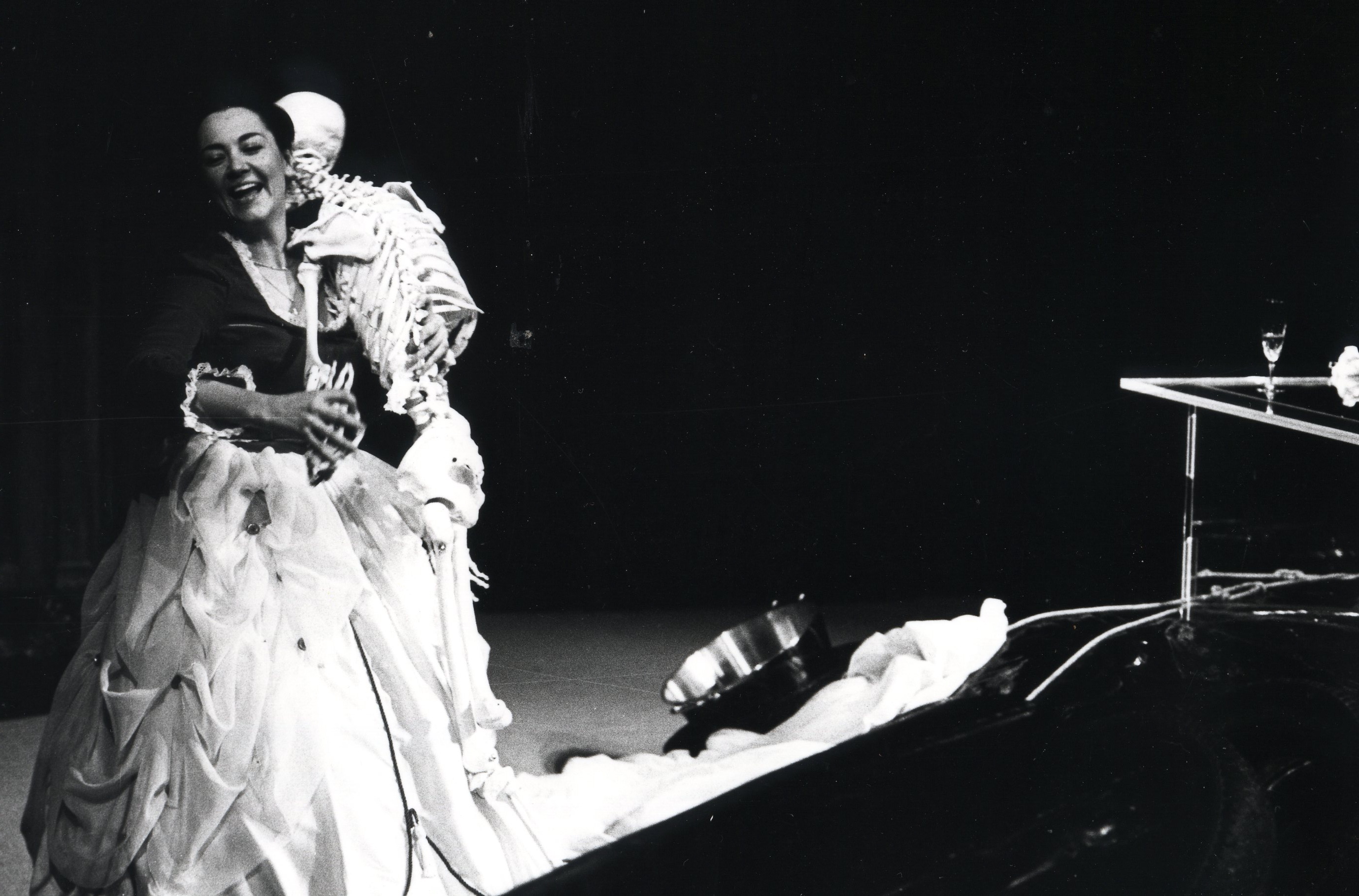 Représentation de "Morte à Yonville", adaptation de Madame Bovary par Jean-Louis Sarthou, en février 1981 à la Fondation Deutsch de la Meurthe (Paris): Dany Tayarda